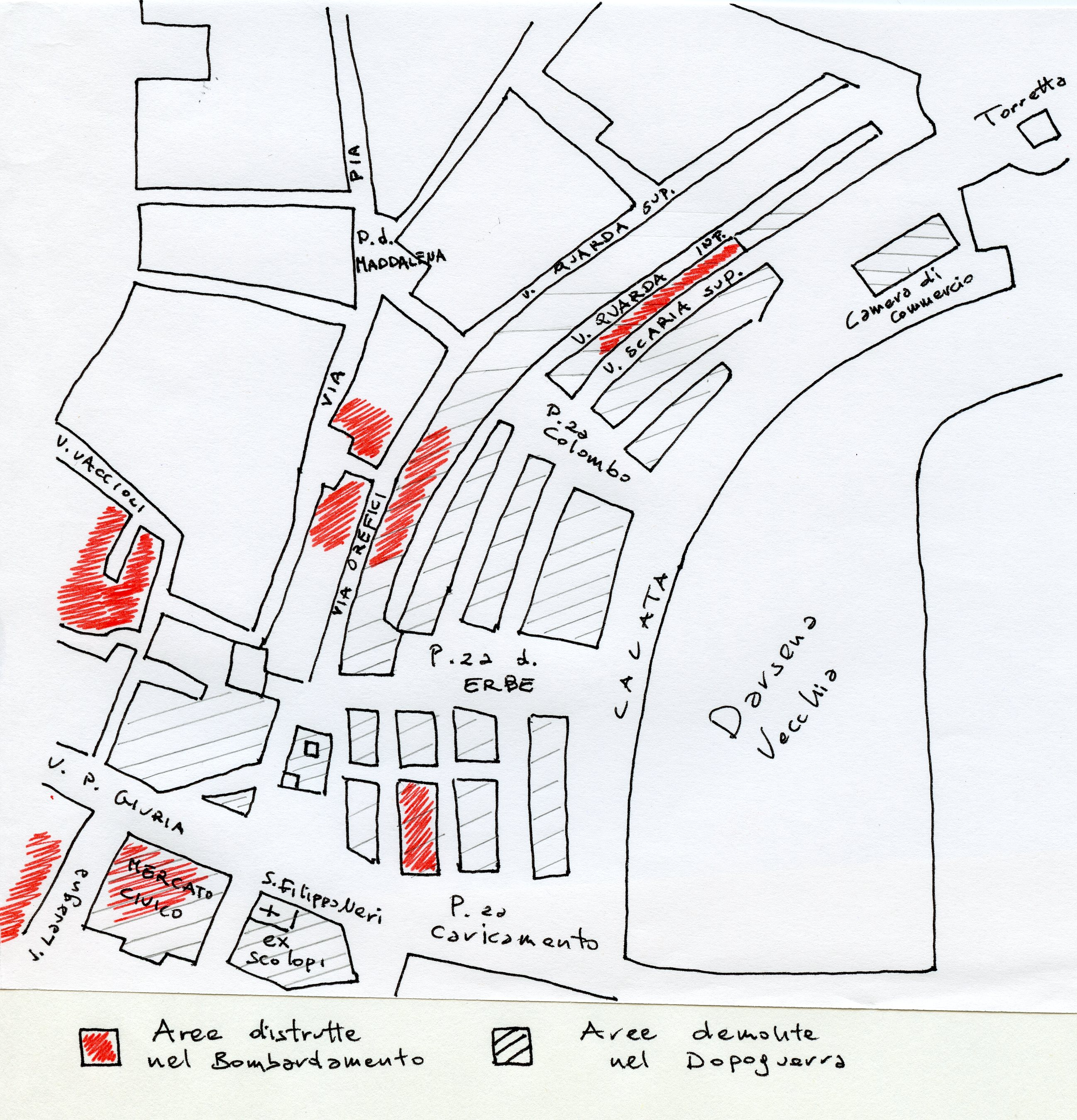 Disegno a corredo del testo